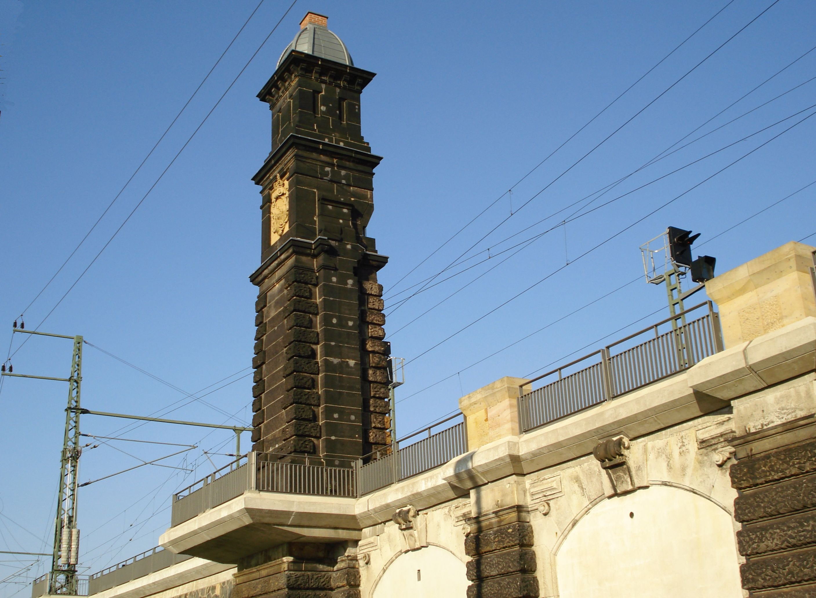 The Station Dresden Mitte.